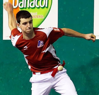 Julen Martija, Etxeberriko (Arakil, Nafarroa Garaia) esku huskako pilotaria